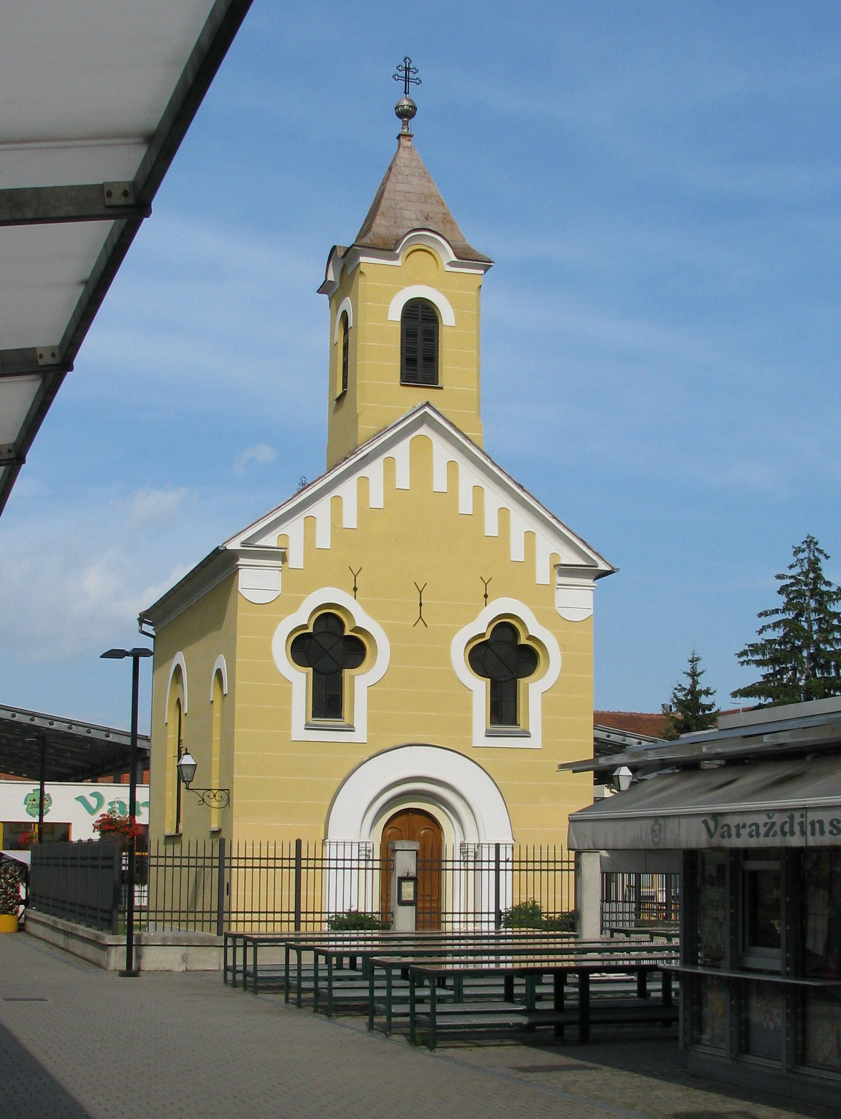 Pravoslavna crkva sv. Đorđa u Varaždinu